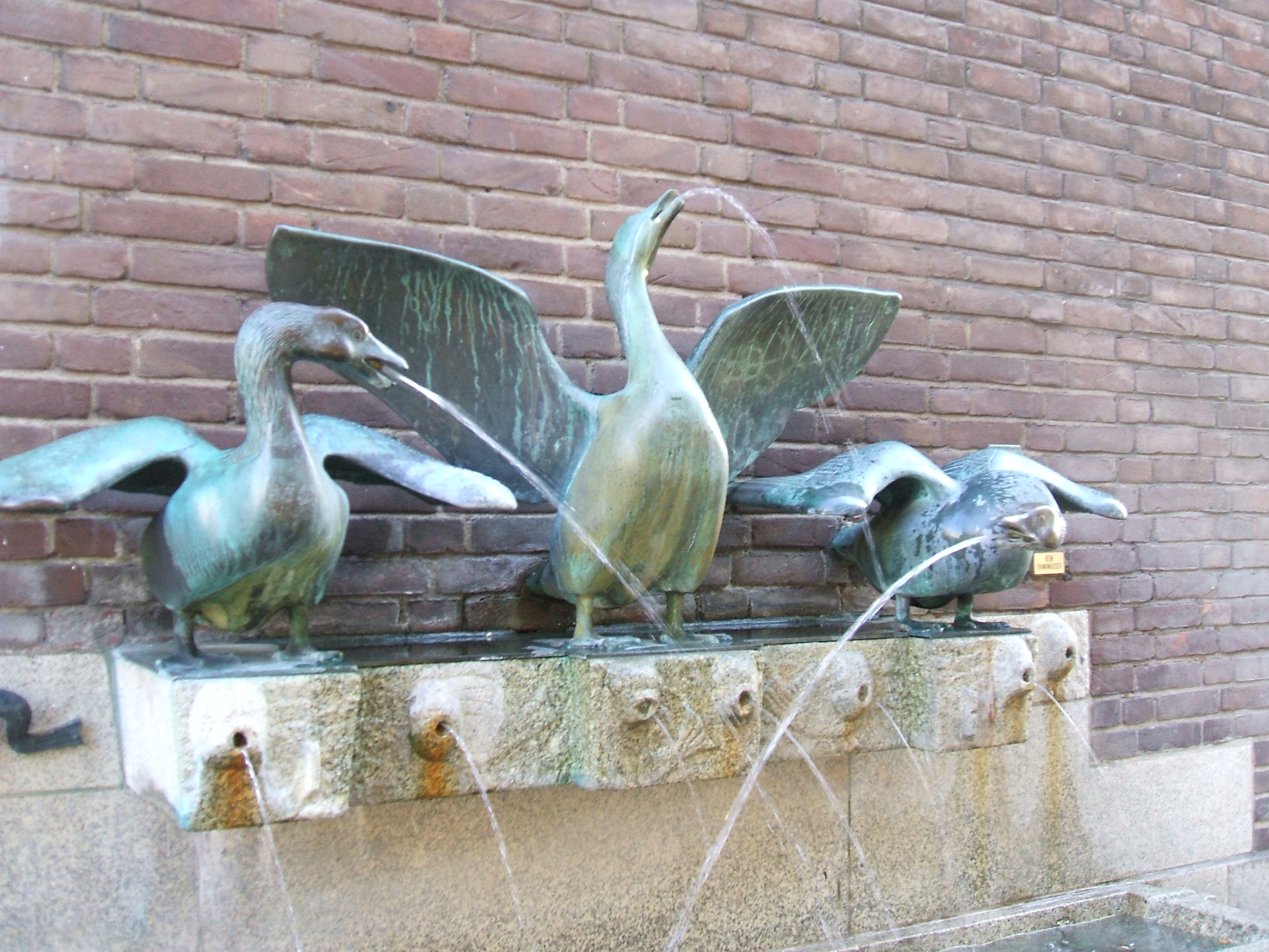 Düsseldorfi köztéri szoborkút; Gänsebrunnen von Willy Meller, 1956 an der Einmündung der Zollstraße zum Marktplatz in Düsseldorf